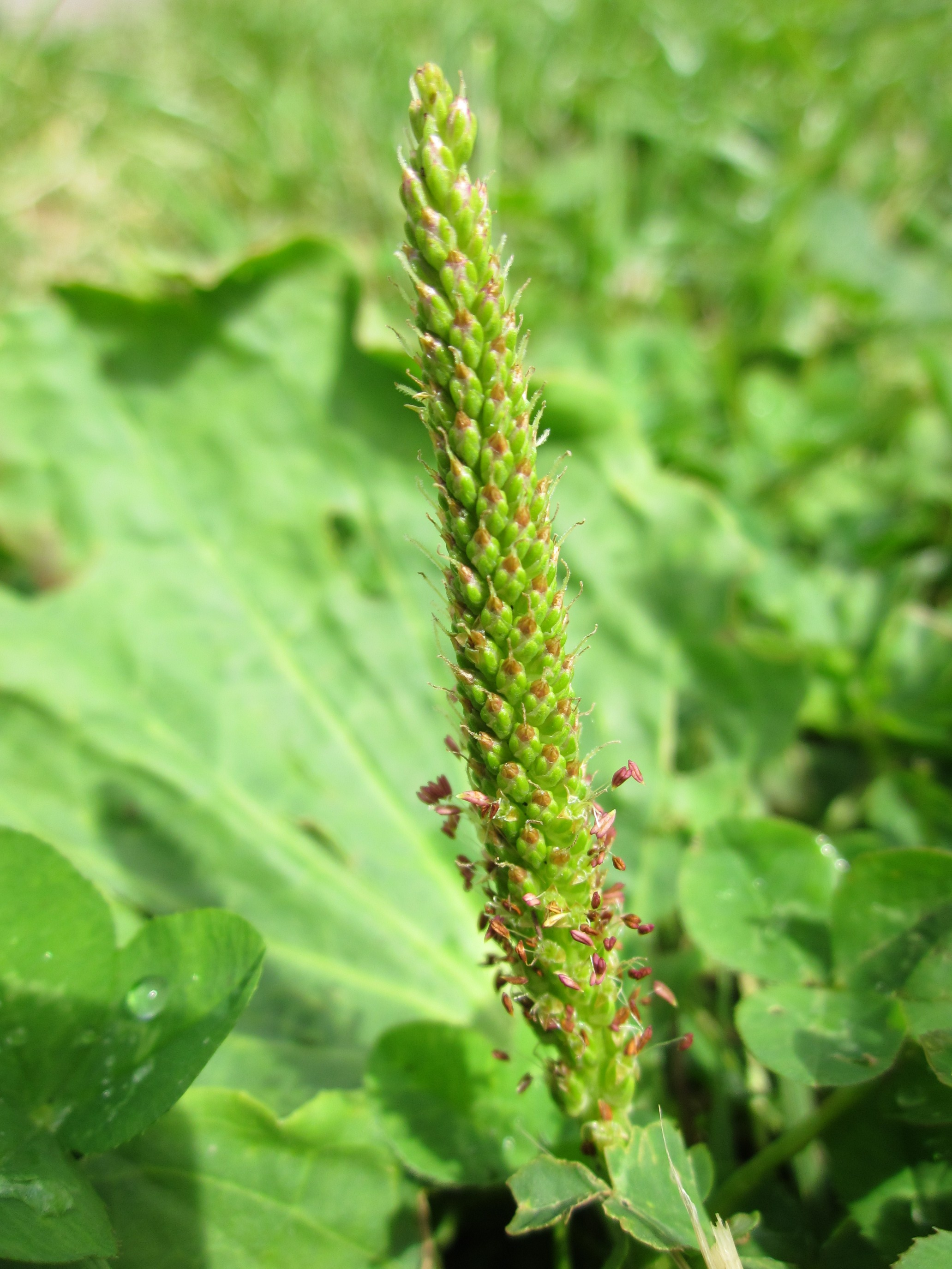 Breitwegerich (Plantago major) am Staden in Saarbrücken